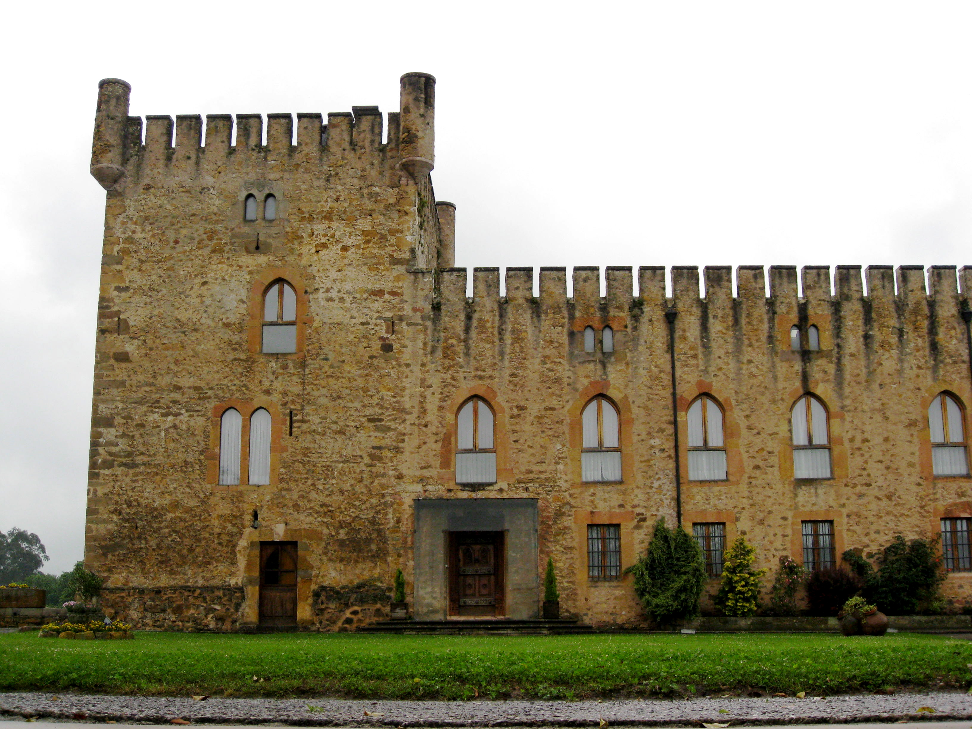 Palacio de Villanueva en San Cucao, concejo de Llanera, Asturias, España.